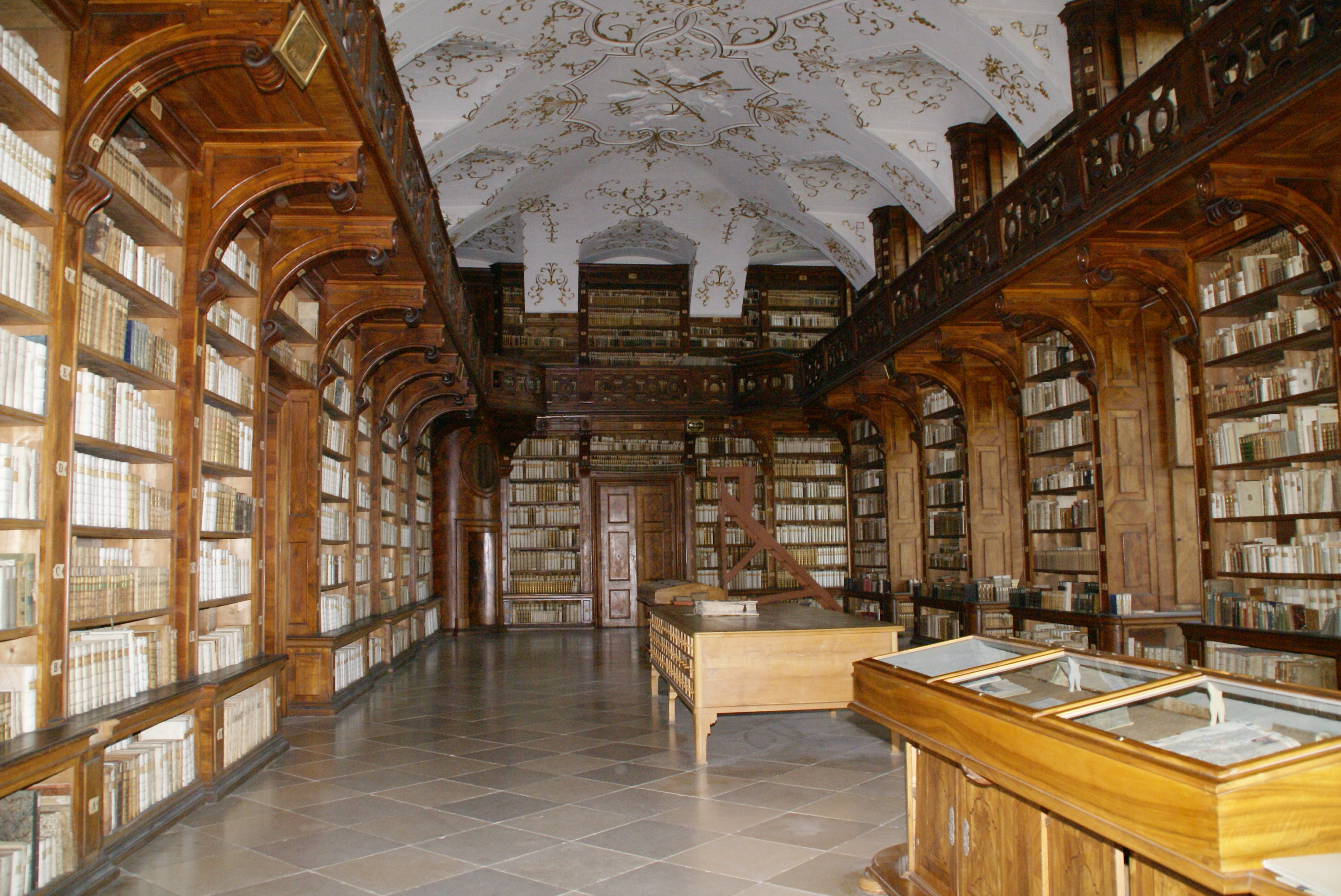 Bibliothek im Stift Göttweig. Diese liegt im Konventsbereich auf der Ostseite des Stiftes und ist daher nicht öffentlich zugänglich